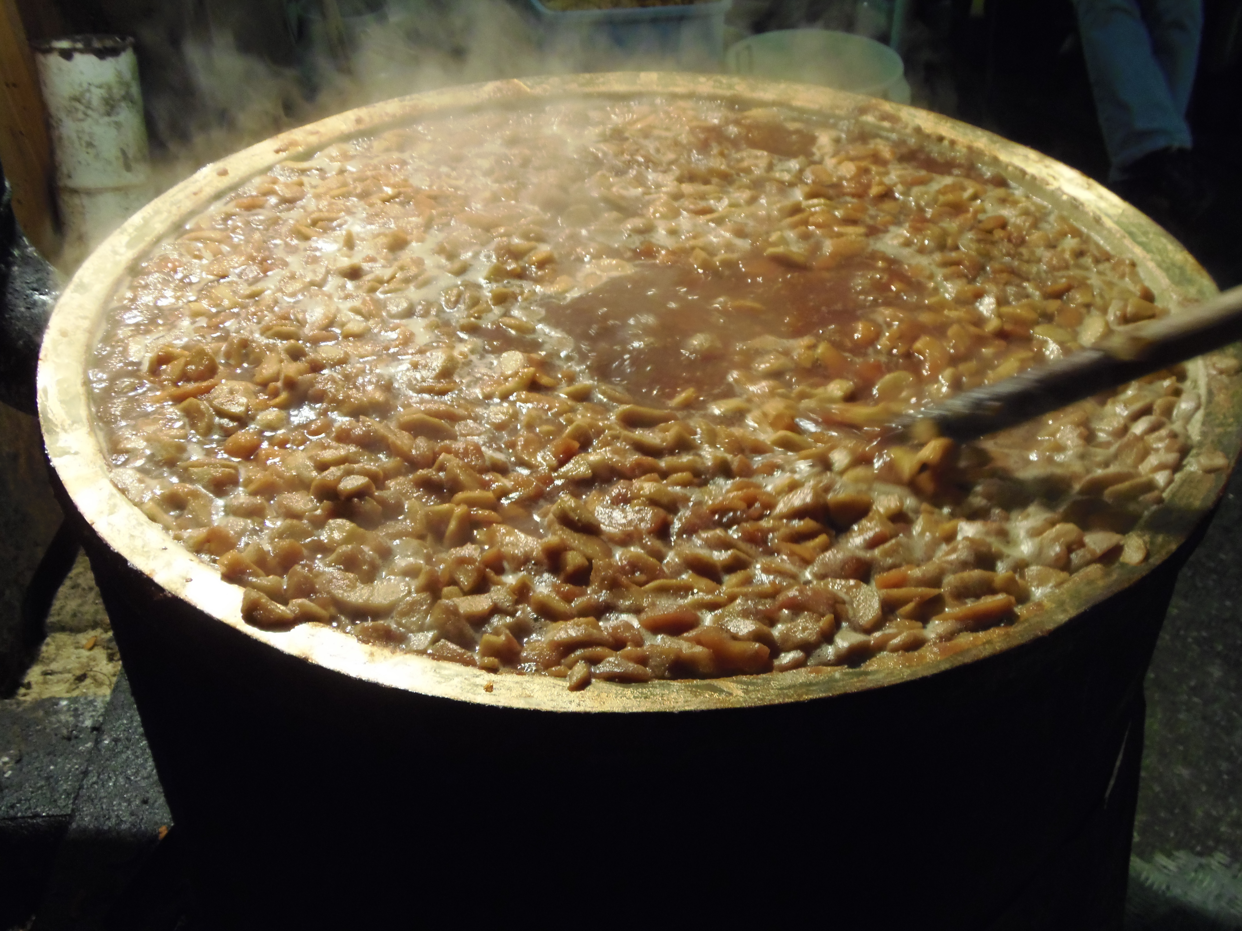 Ramougerie de Pommé